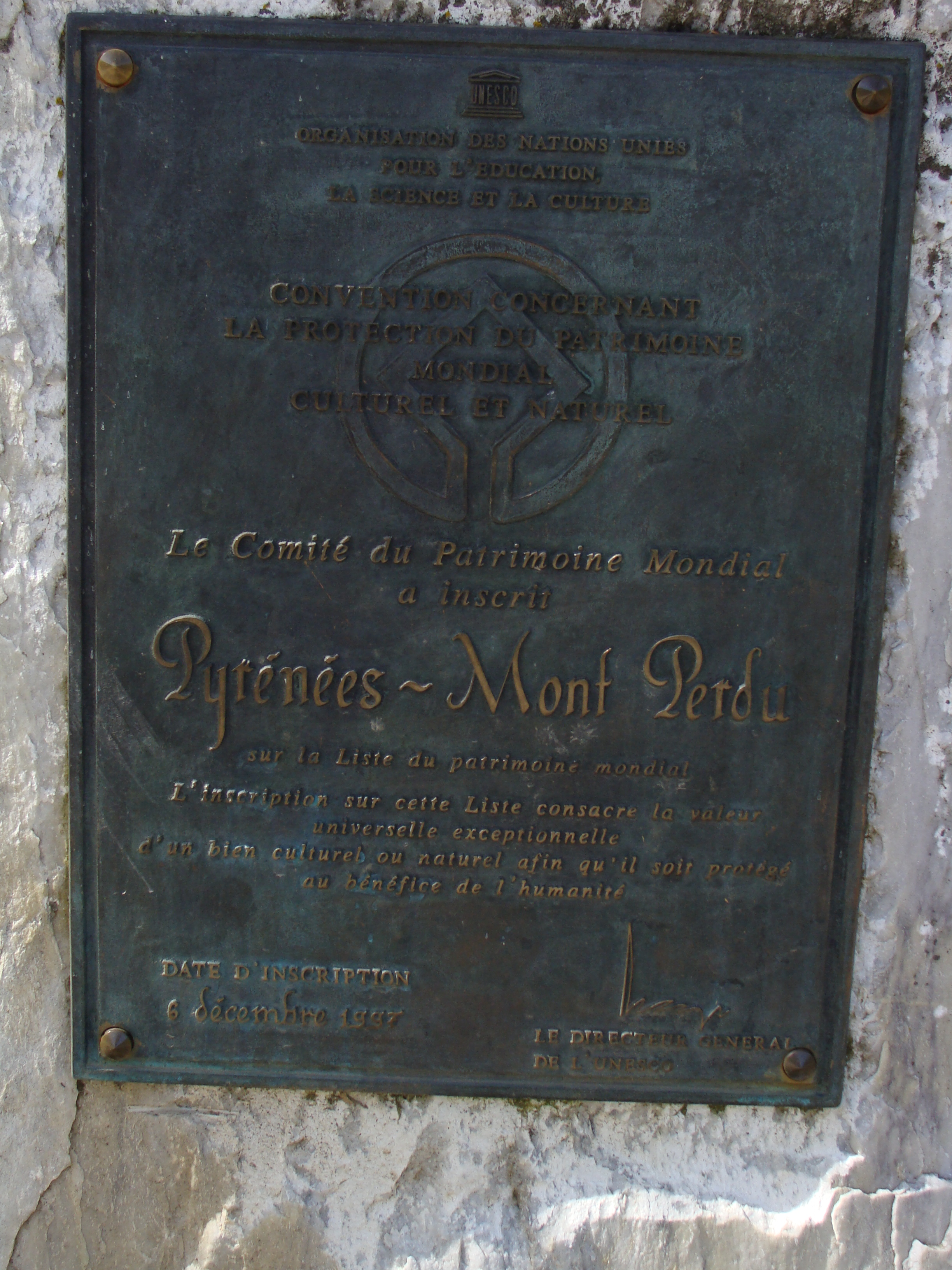 Cirque de Gavarnie - Plaque - inscription au patrimoine mondiale